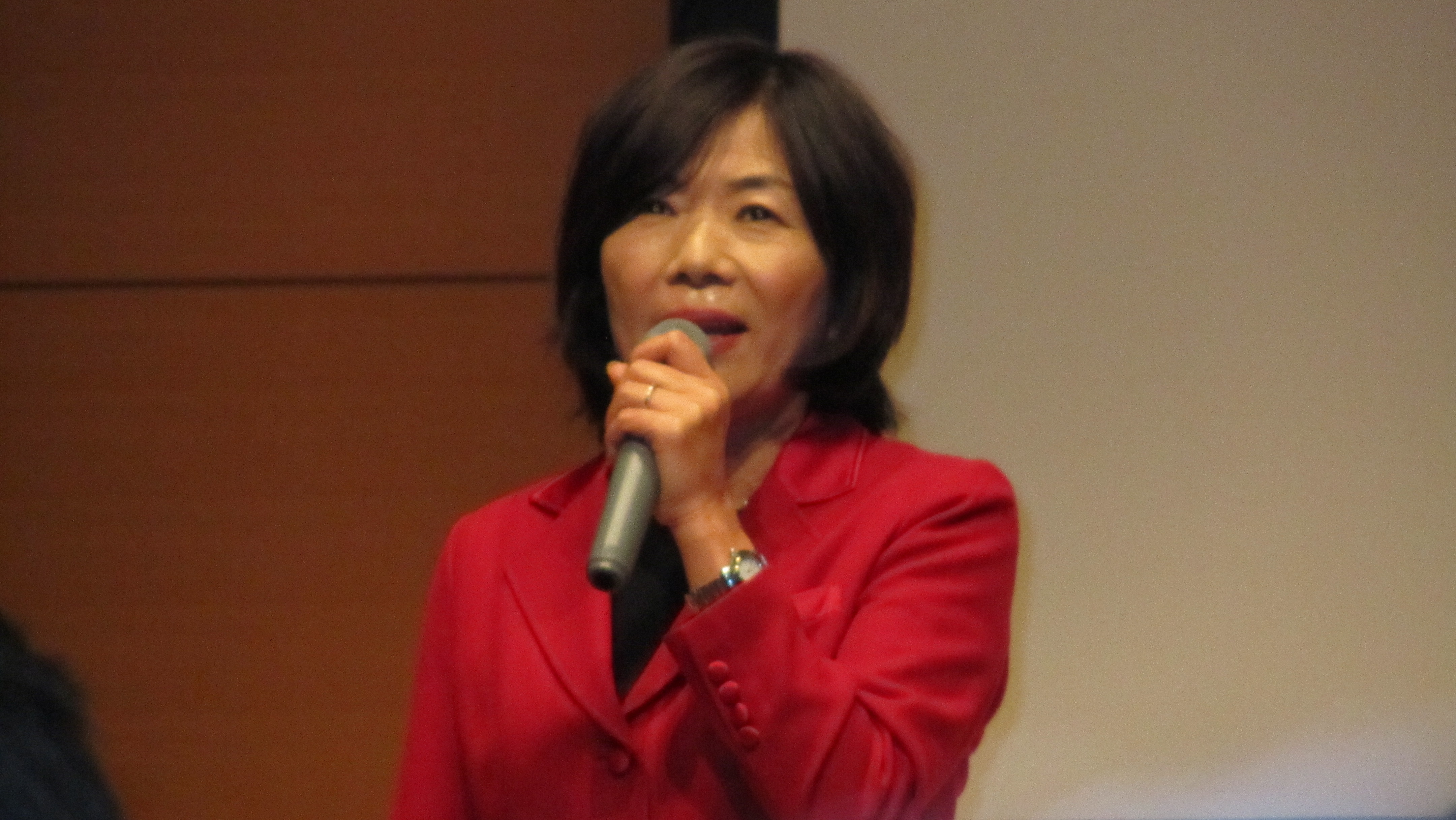 題名：演説中の森ゆうこ氏（元文部科学副大臣、元参議院議員、生活の党） 場所：「饗宴IV」Grand Hall(品川) 日時：2013年12月22日(日)